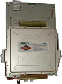 Neo Geo 64